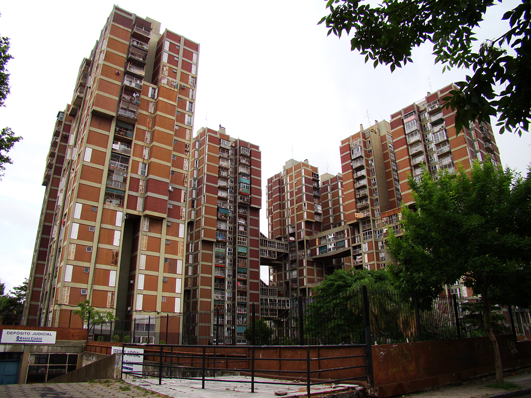 Vista desde la calle Deán Funes del Conjunto Rioja, en Parque Patricios, Buenos Aires, Argentina.